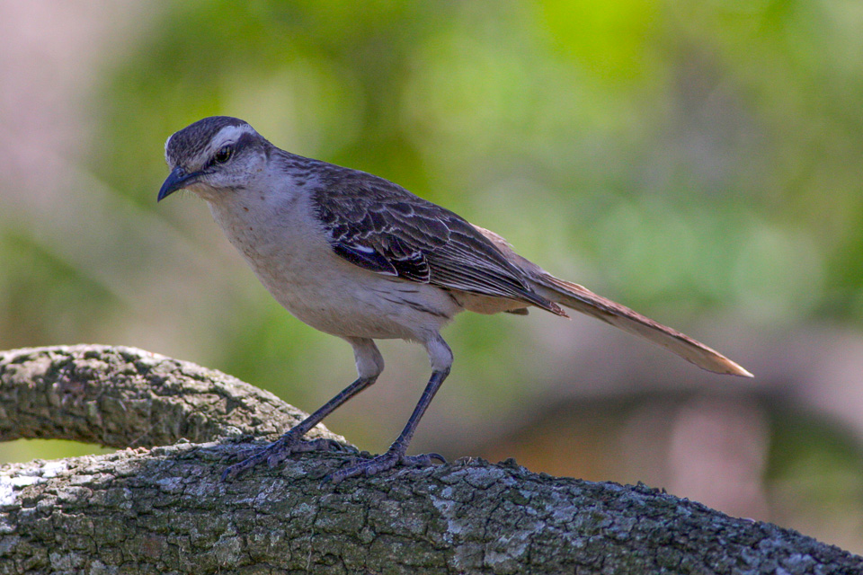 Costanera Sur,Buenes Aires